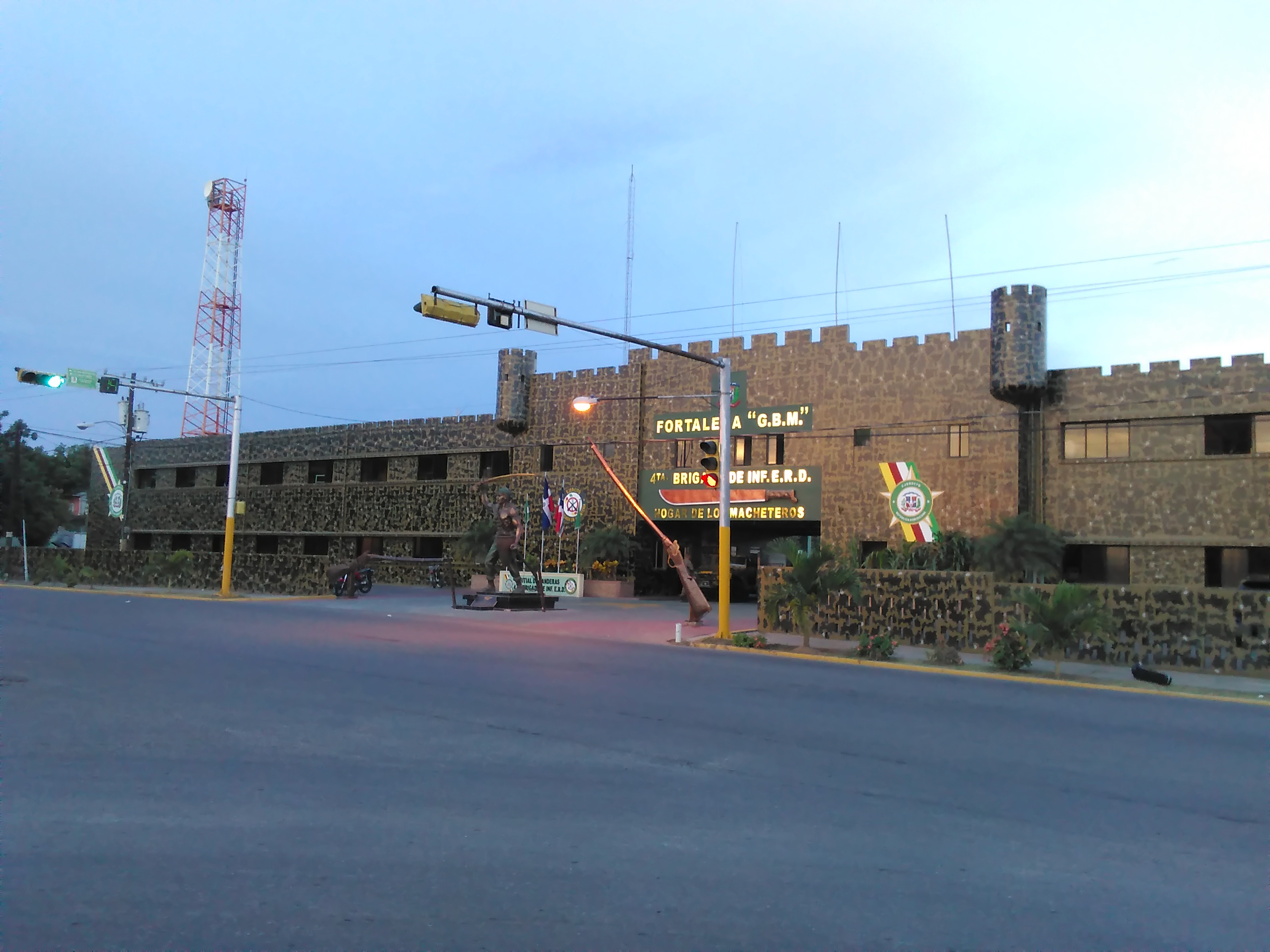 4ta Brigada de Infantería del Ejercito Dominicano, Valverde, Mao.